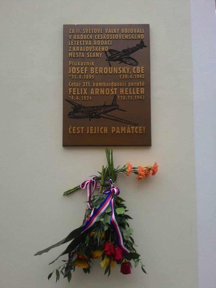 Pamětní deska Josef Berounský a Felix Arnošt Heller ve Slaném, Soukenická ulice